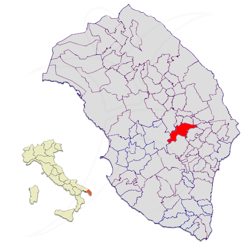 Il territorio del comune di Maglie nella provincia di Lecce